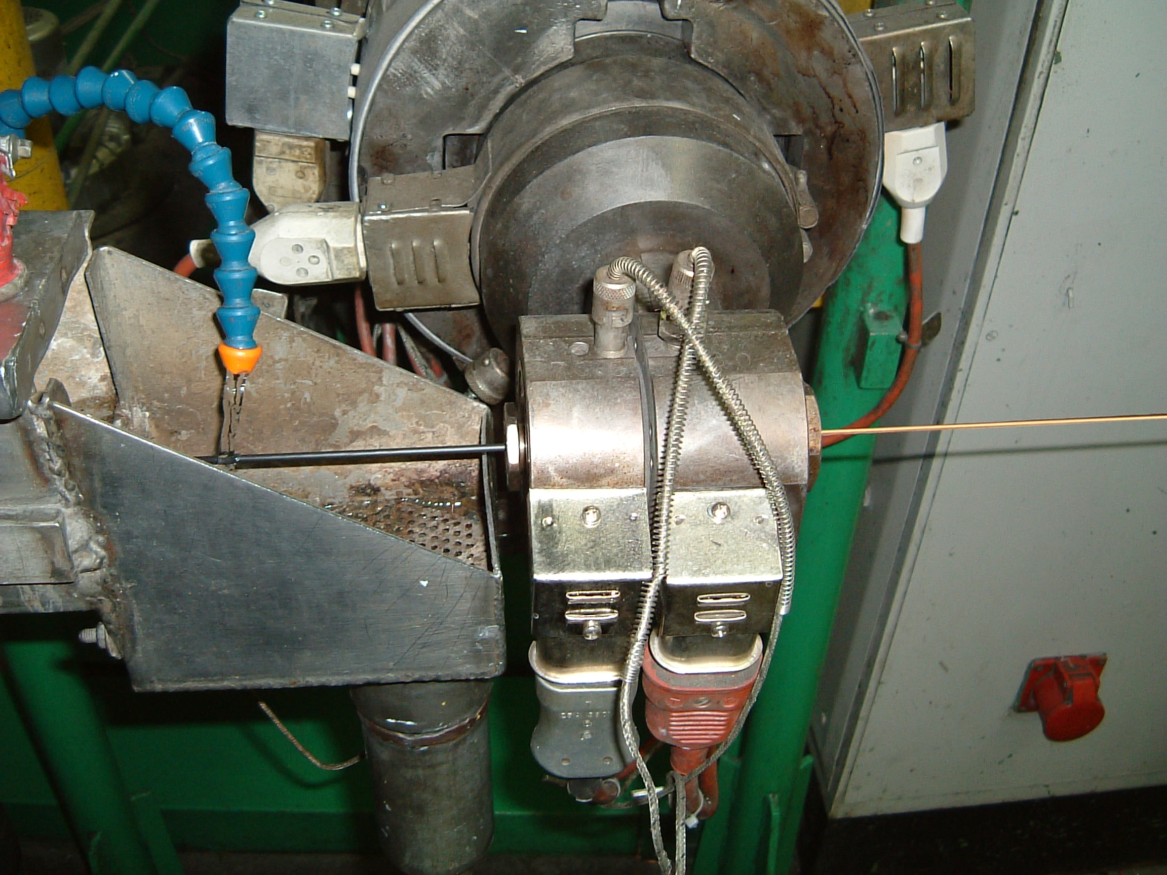 Aufbringen des Mantels auf eine Einzelader